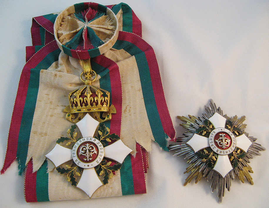 Орден „За Гражданска Заслуга“ I ст. 1908-18г.